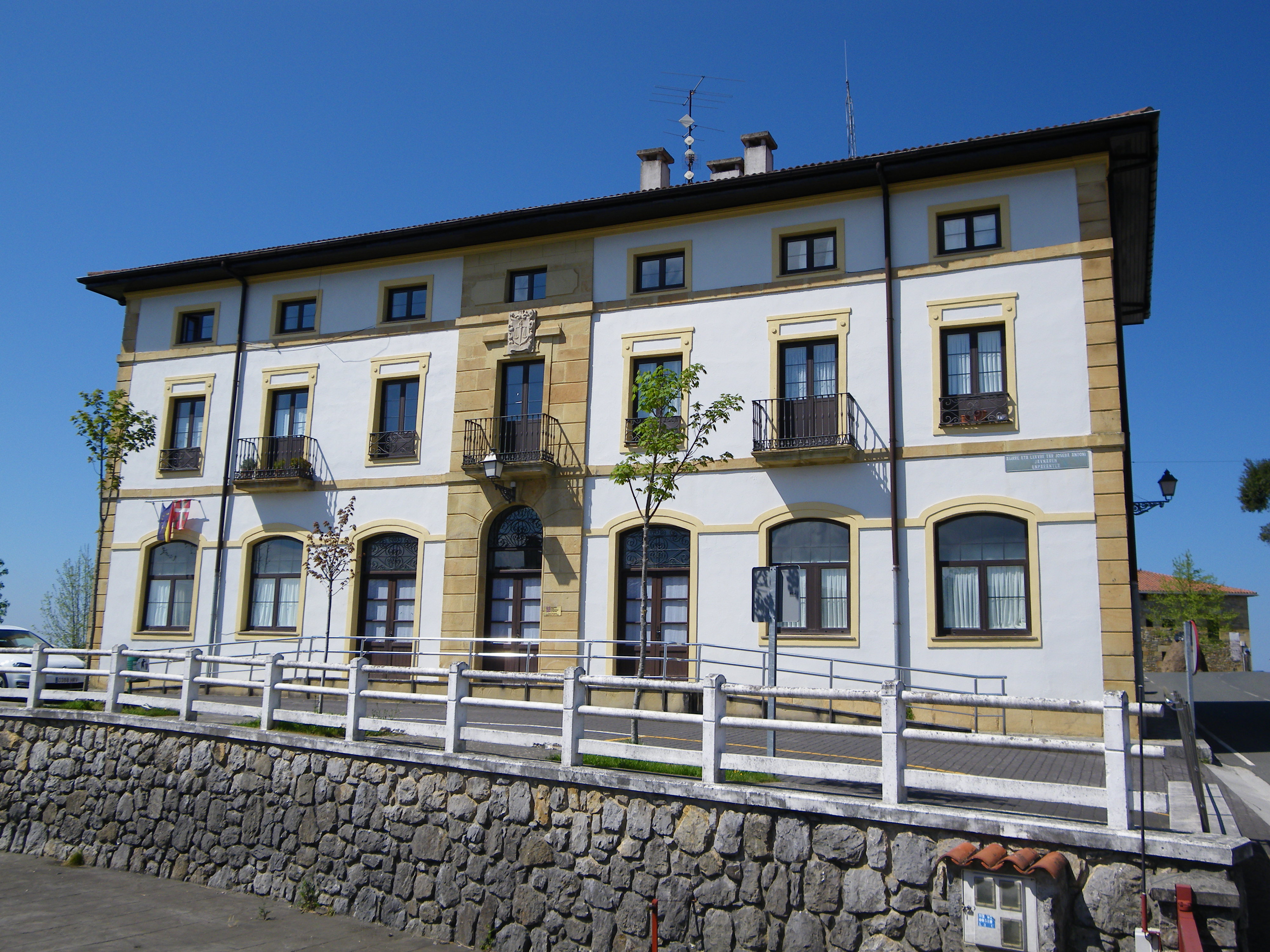 Mendatako udaletxea, Elexalde auzoa, Mendata, Bizkaia.